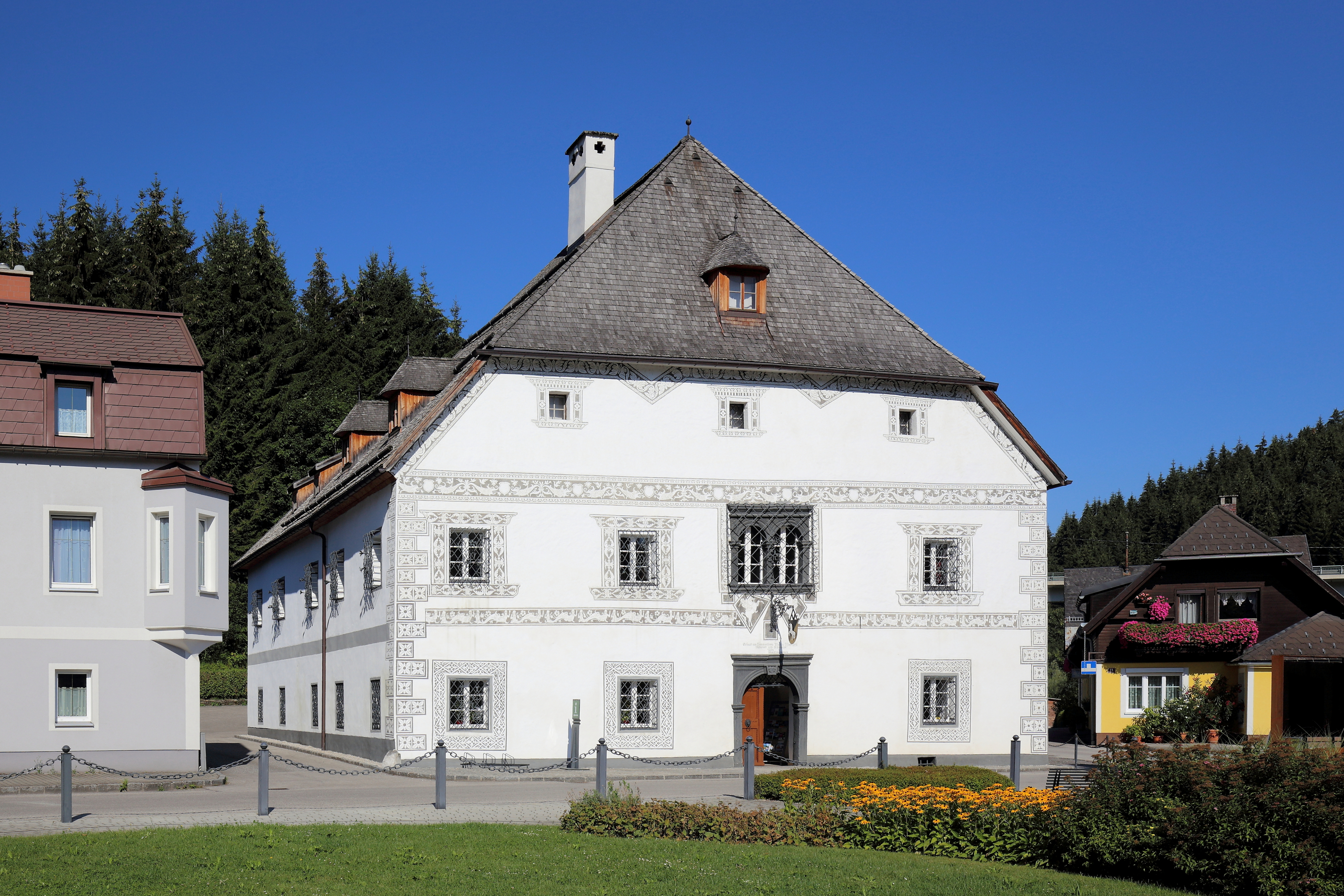 Das sogenannte Amonhaus in der niederösterreichischen Marktgemeinde Lunz am See.Ein frühneuzeitliches ehemaliges Hammerherrenhaus, das 1551 unter dem Hammerherrn Martin Ofner errichtet und um 1600/10 erweitert wurde. Um 1770 kam es in den Besitz der Familie Amon und ist seit 1960/61 im Besitz der Gemeinde, die darin das Gemeindeamt und ein Museum einrichtete.